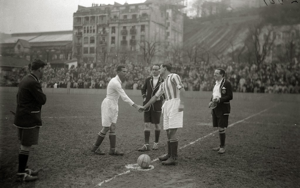 Título original: La Real Sociedad en el primer partido de Liga de Primera División en el campo de Atotxa (1/4) Localización: San Sebastián (Guipúzcoa)